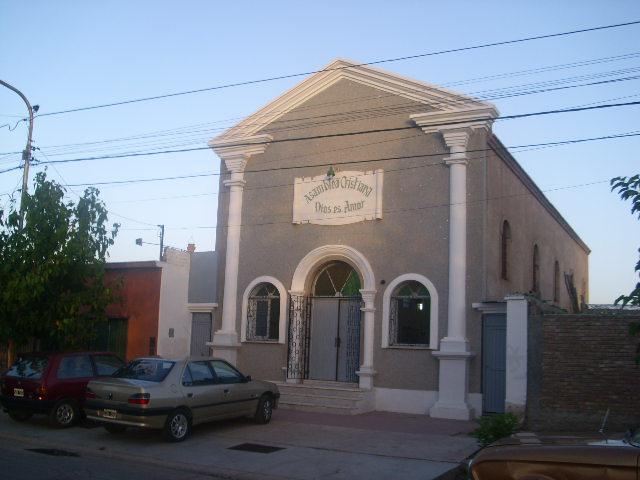 Iglesia Asamblea Cristiana de Gutiérrez.